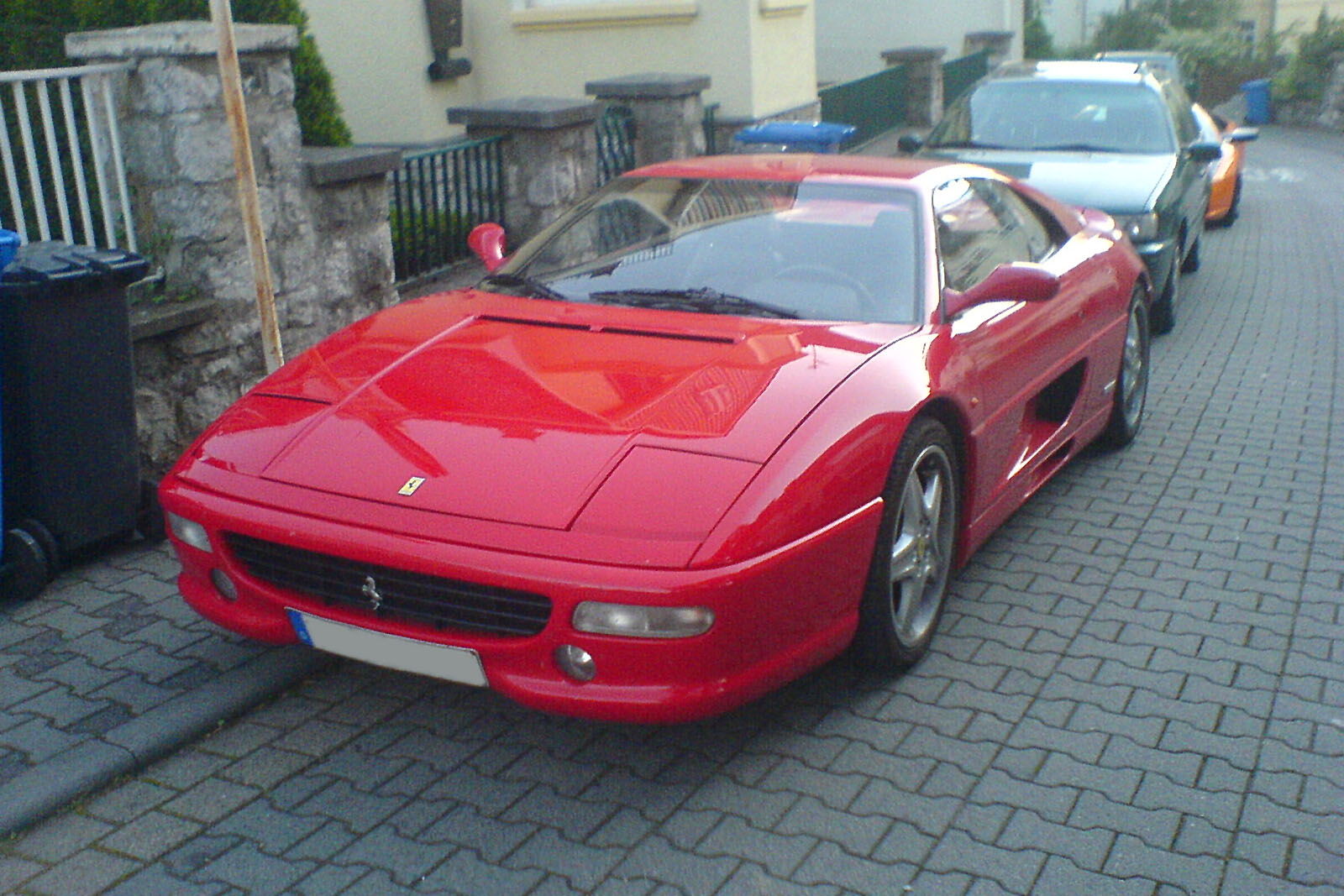 Ferrari 355 F1 Berlinetta